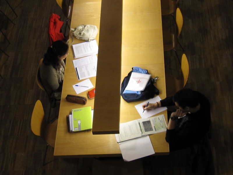 Sala de estudio de la bibiblioteca